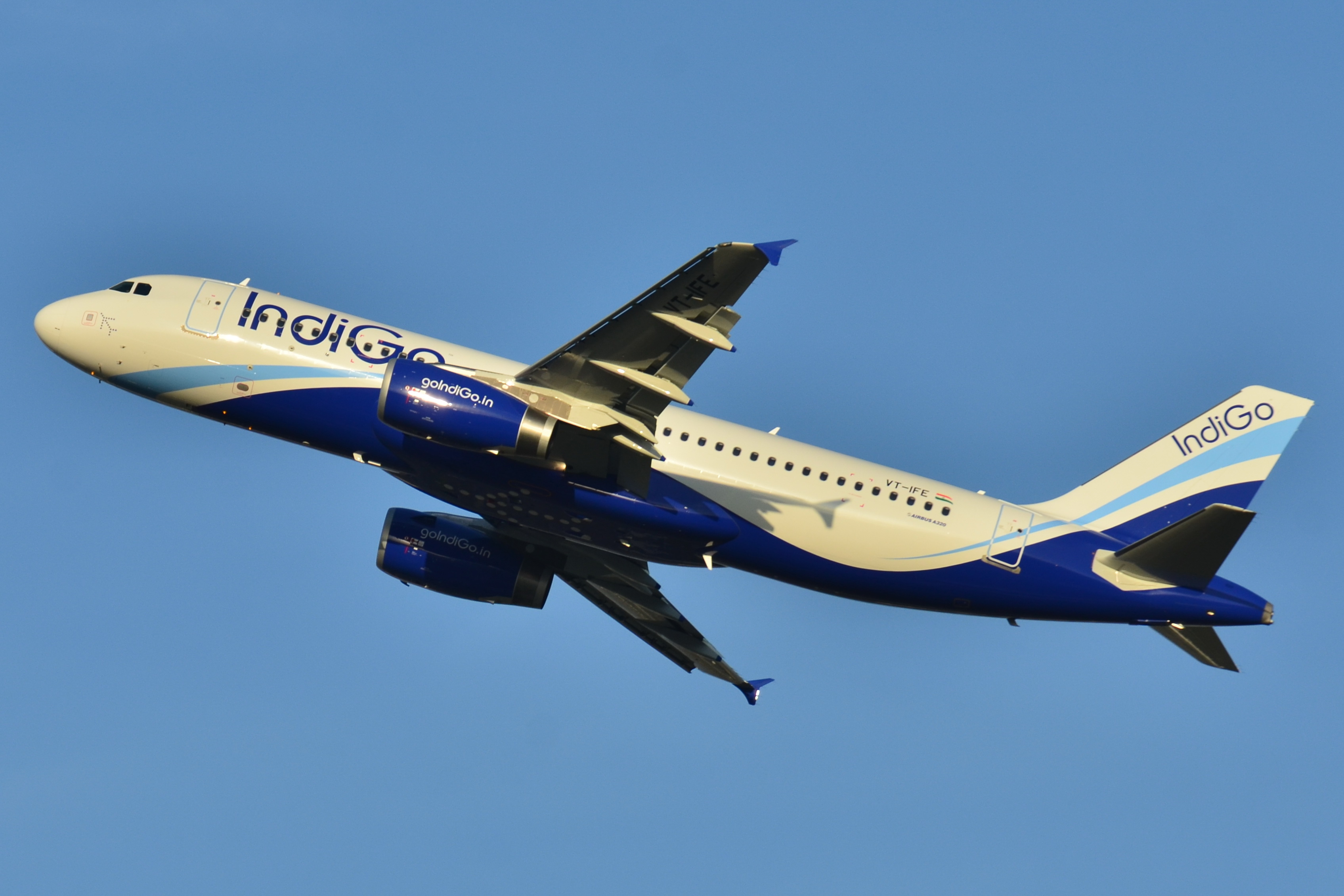 Photo prise à l'aéroport de Toulouse-Blagnac (LFBO) en France. Picture take at Toulouse-Blagnac Airport (LFBO) in France.